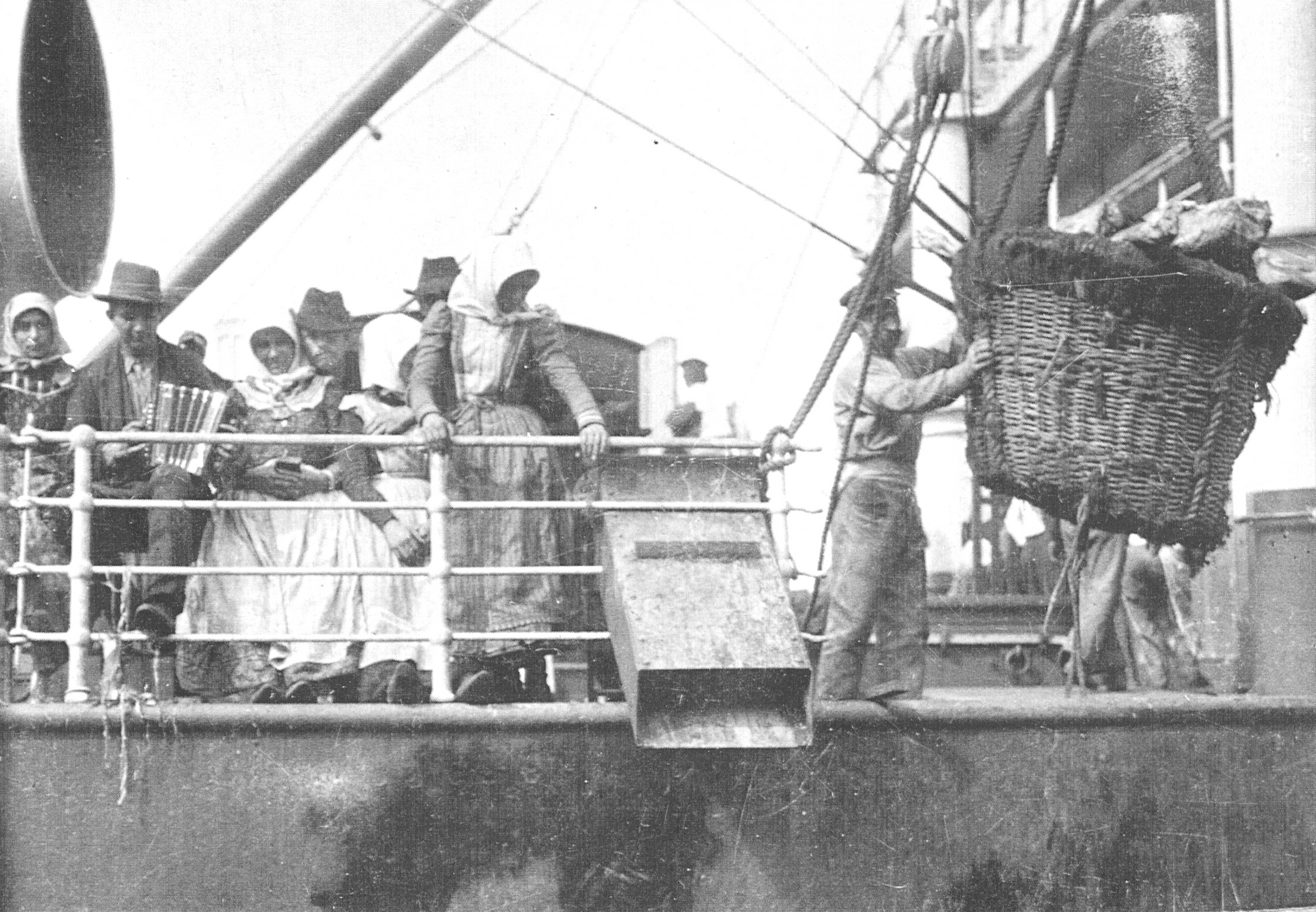 Auswanderer aus Österreich-Ungarn bei der Abreise in Triest auf einem Schiff der Austro-Americana / Austro-Hungarian Emigrants